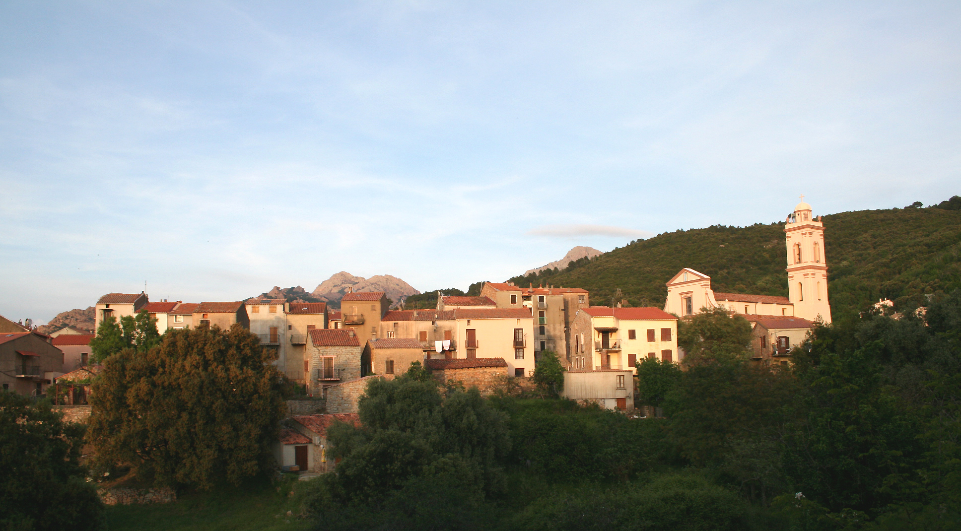 Piana France - ( Corse du Sud), le village. Corsu: Piana Francia ( Corsica suttana), lu paese.